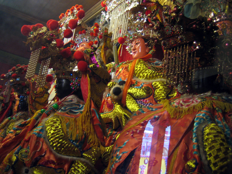 南瑤宮媽祖神像